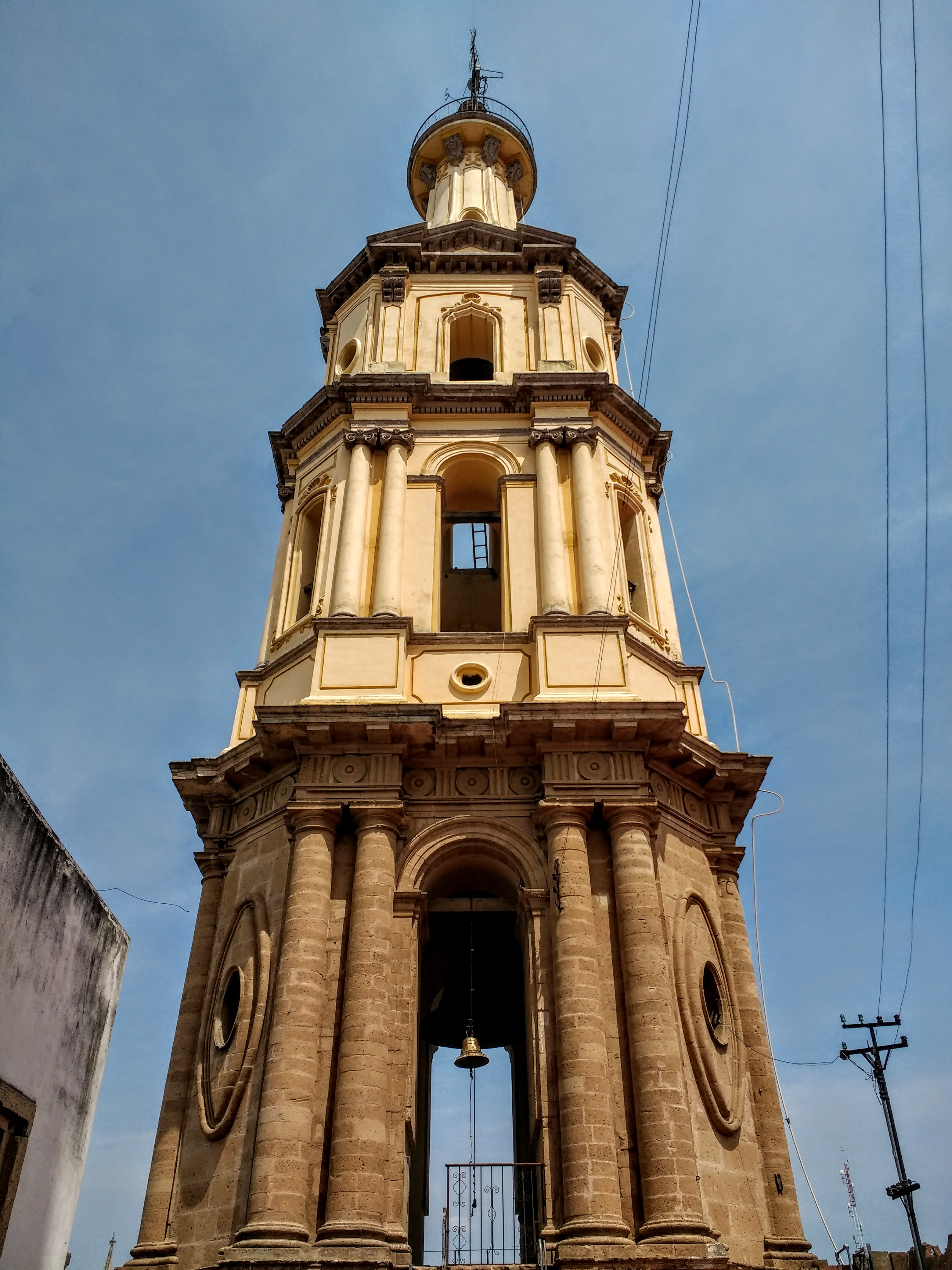 Campanario